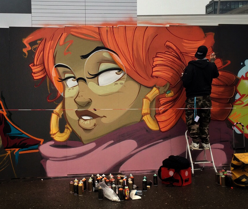 Arbeitsprobe